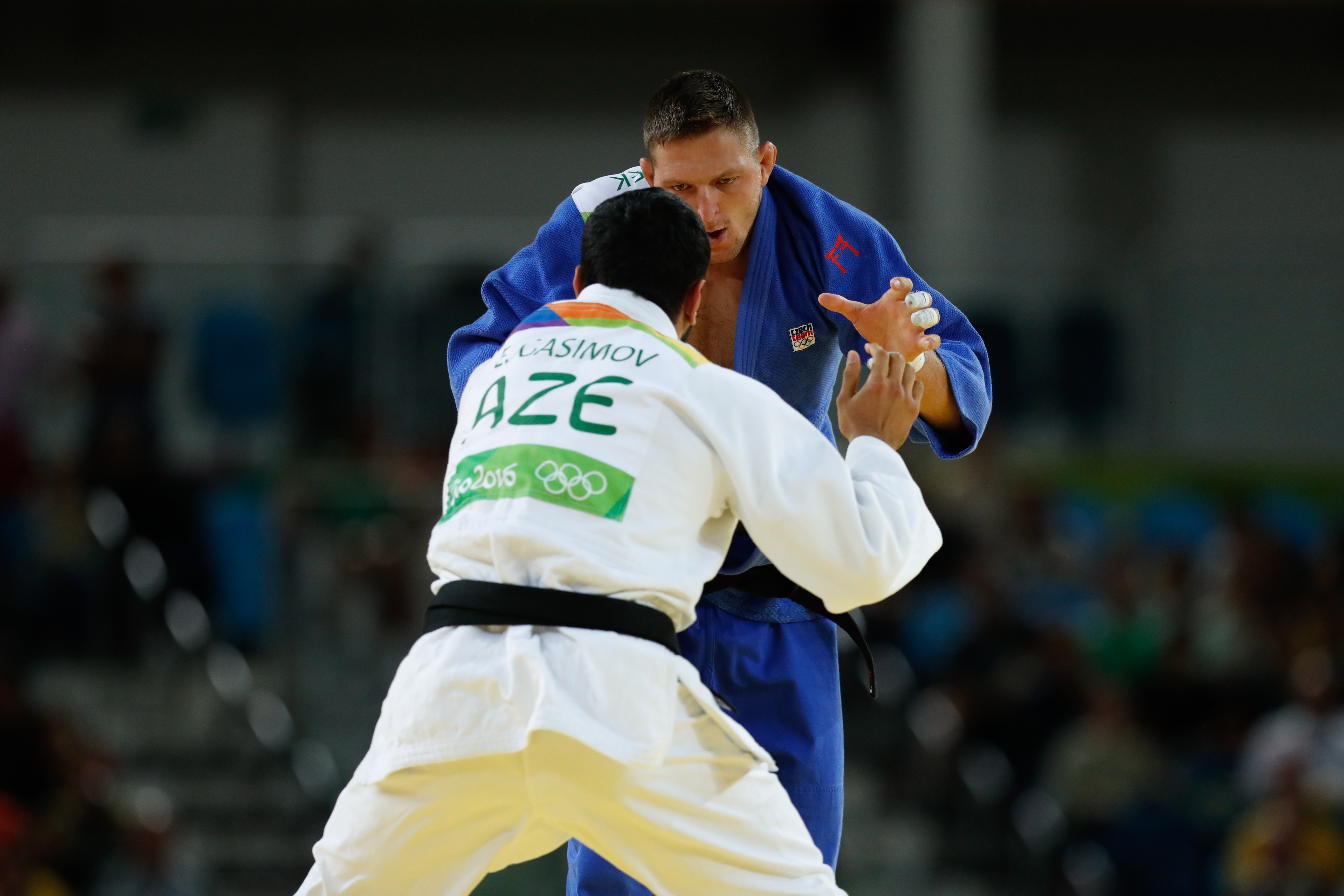 Rio de Janeiro - O judoca tcheco Lukas Krpalek vence o azerbaijano Elmar Gasimov na categoria até 100 quilos e ganha medalha de ouro na Rio 2016 (Fernando Frazão/Agência Brasil)